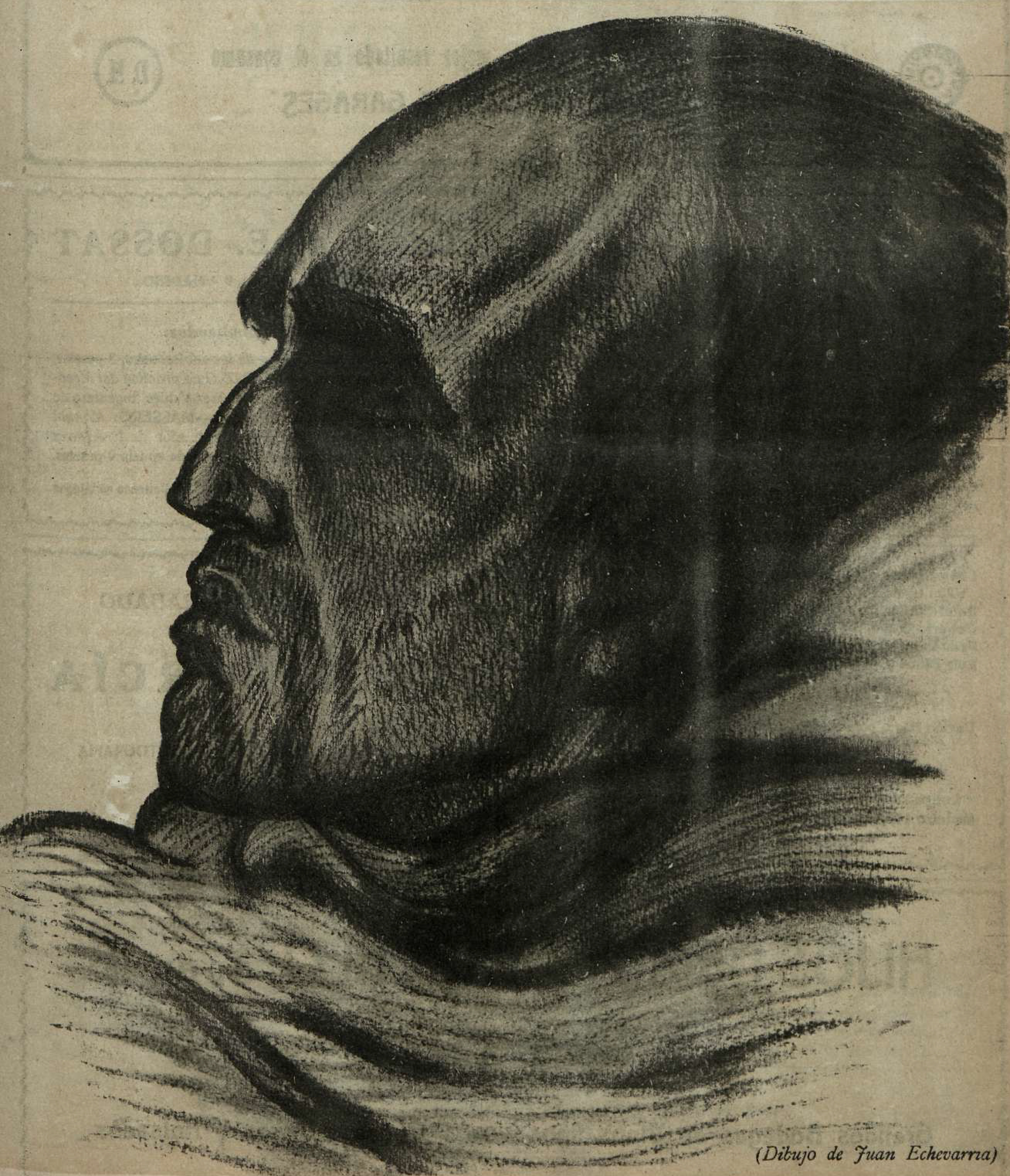 Julio Antonio, dibujo de Juan Echevarría.